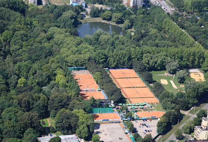 Bytom z lotu ptaka - Park miejski, korty tenisowe klubu KS Górnik Bytom.